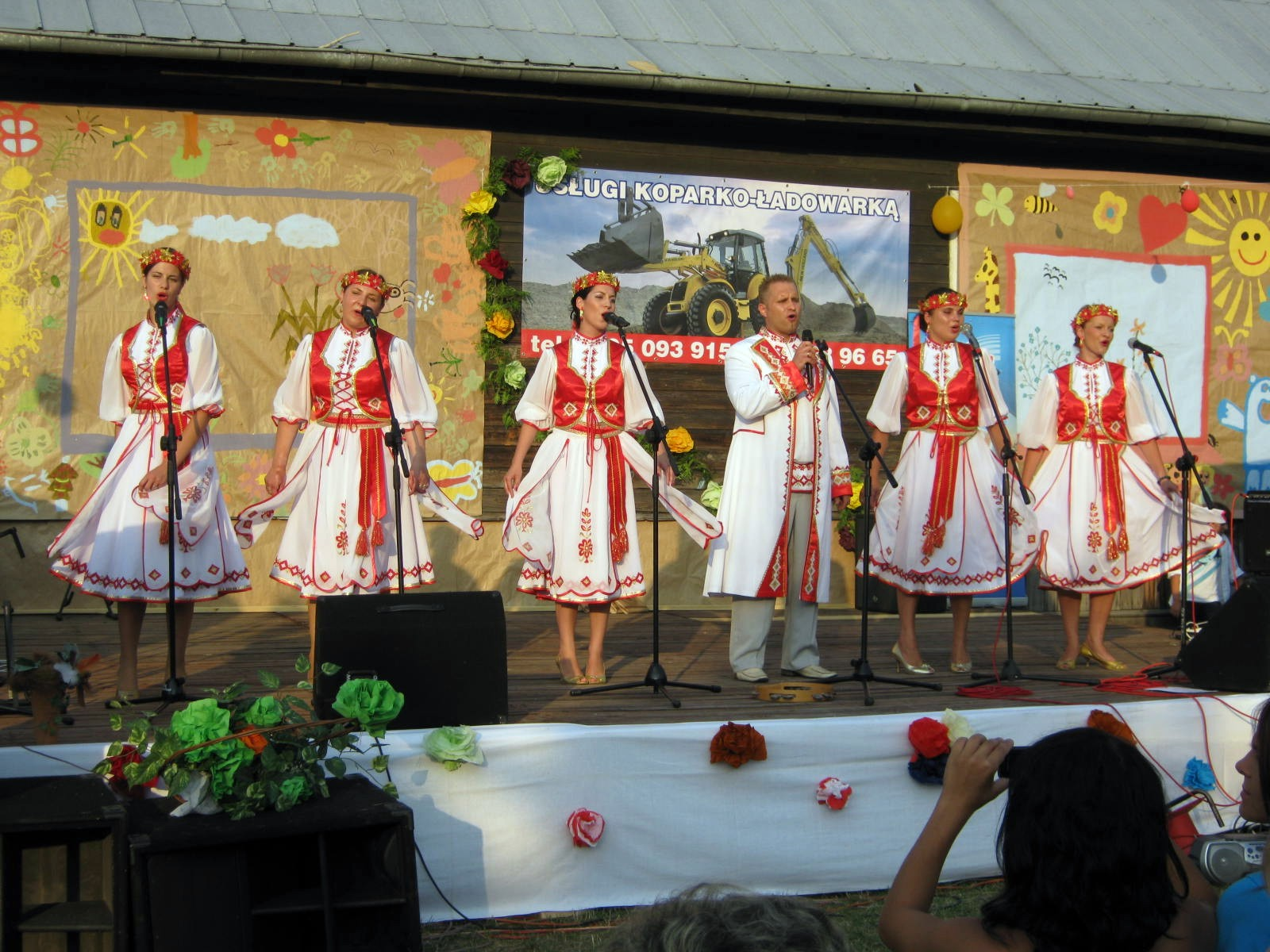 Występ zespołu "Kalinka" z Gródka na jubileuszu 235-lecia wsi Sokole.